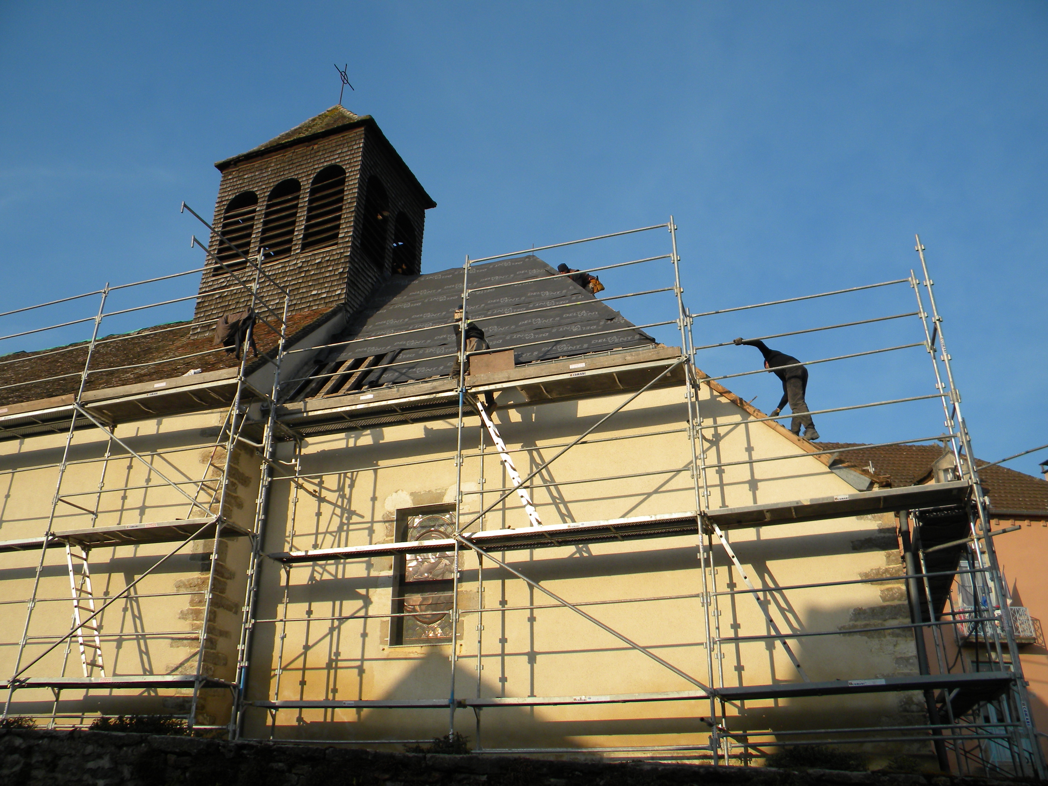 Eglise